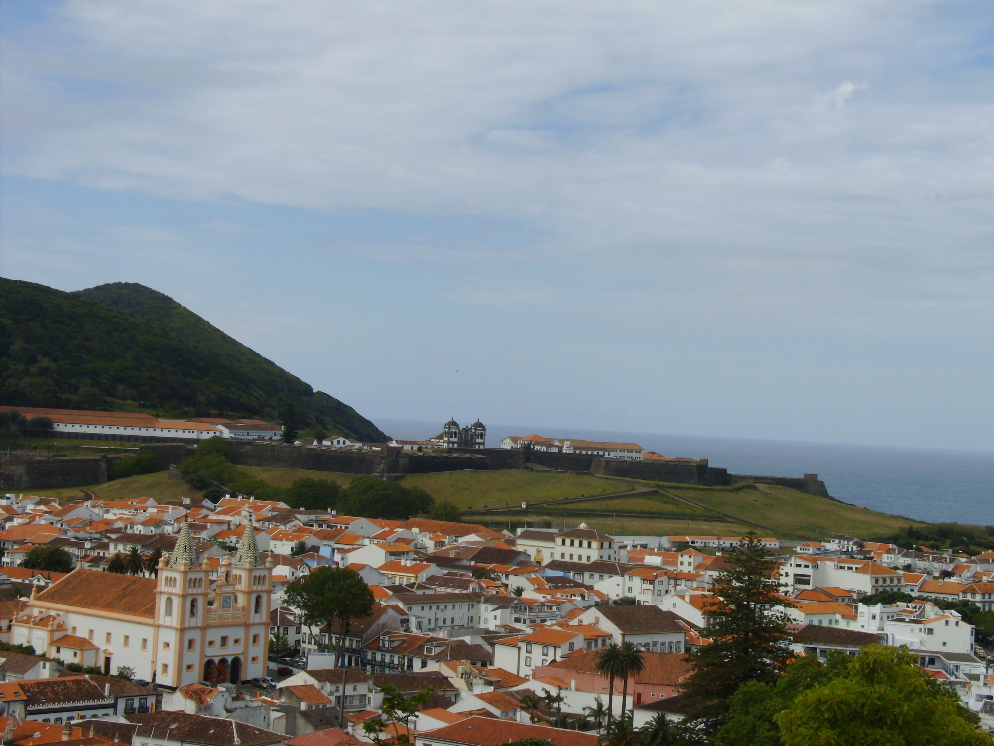 Angra do Heroísmo, Ilha Terceira, Açores: centro histórico com a Igreja da Sé; ao fundo o Monte Brasil com a Fortaleza de São João Baptista.